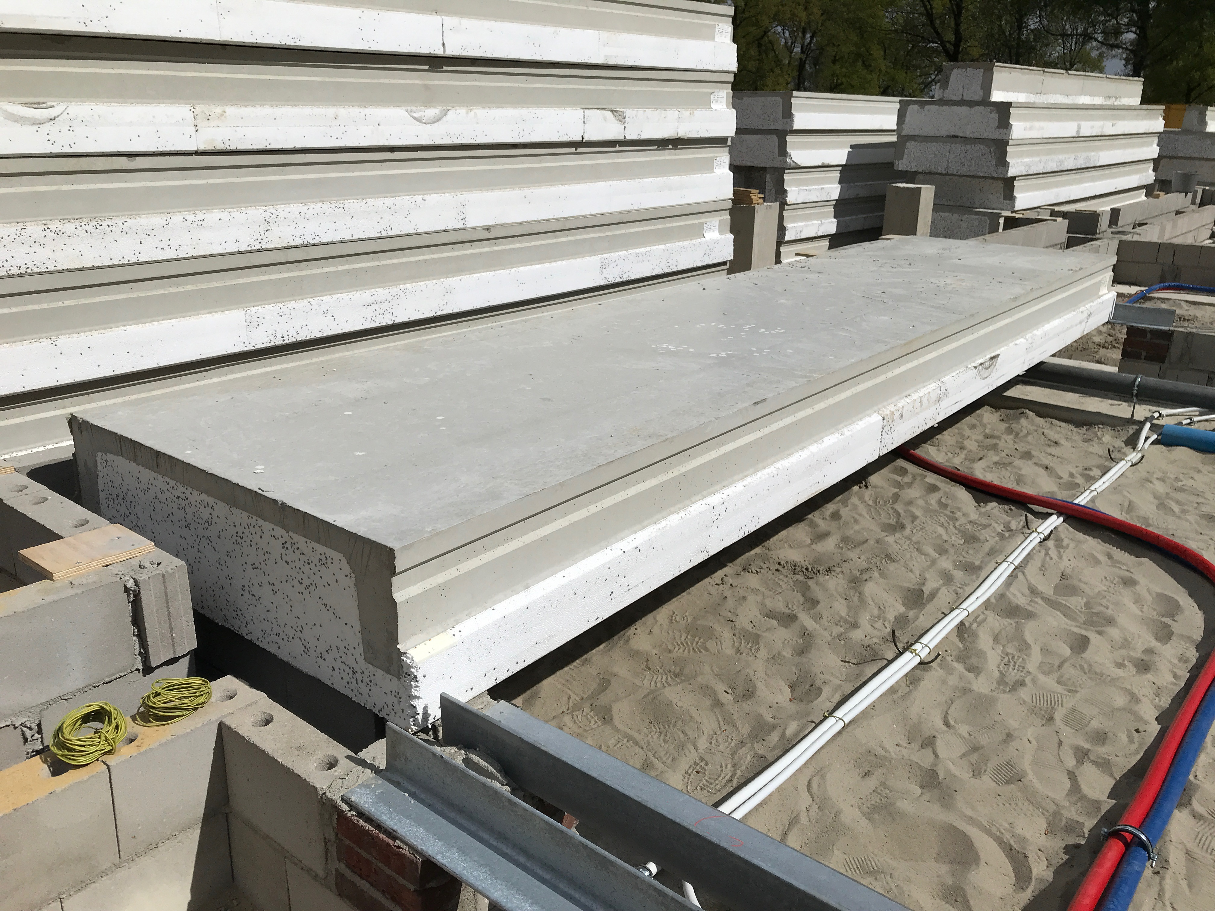 Ribcassettevloer die wordt aangelegd in Beekbergen (stapels elementen in de achtergrond).